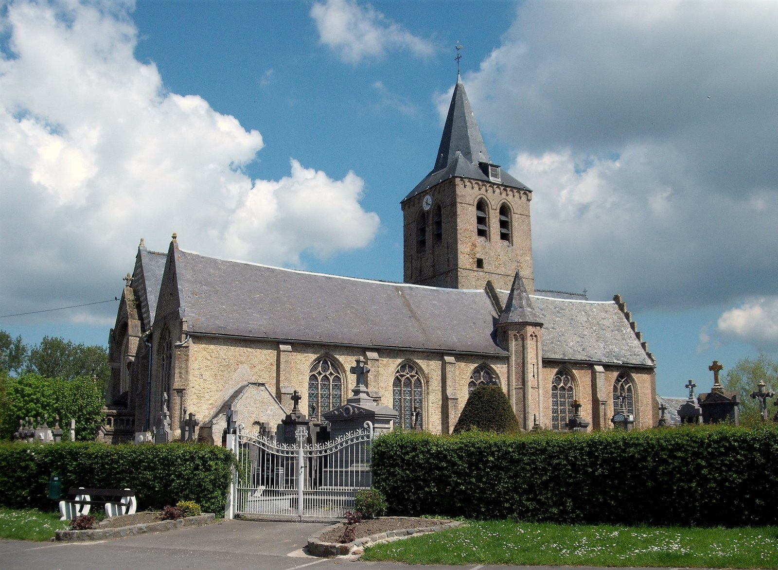 Steene - Flandre française - French Flanders - Frans-Vlaanderen